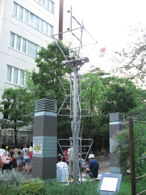 TBS放送センター（東京都港区赤坂）脇にある、TBSテレビが1955年の開局当時から使用していた鉄塔にあったスーパーターンスタイルアンテナのモニュメント。1995年3月に鉄塔が解体された後、このアンテナが放送センター脇に設置された。